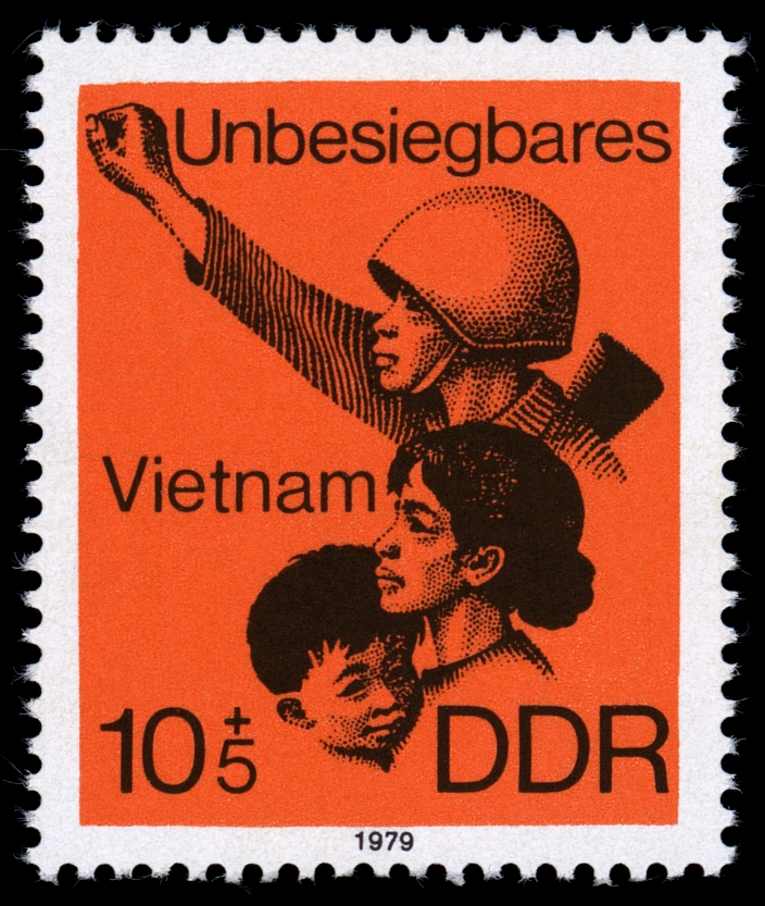 Information: Unbesiegbares Vietnam (VIII), Soldat, Mutter mit Kind Ausgabepreis: 10+5 Pfennig First Day of Issue / Erstausgabetag: 6. November 1979 Auflage: 3.500.000 Entwurf: Preuß Druckverfahren: Offsetdruck Michel-Katalog-Nr: Ländercode-MiNr: 2463